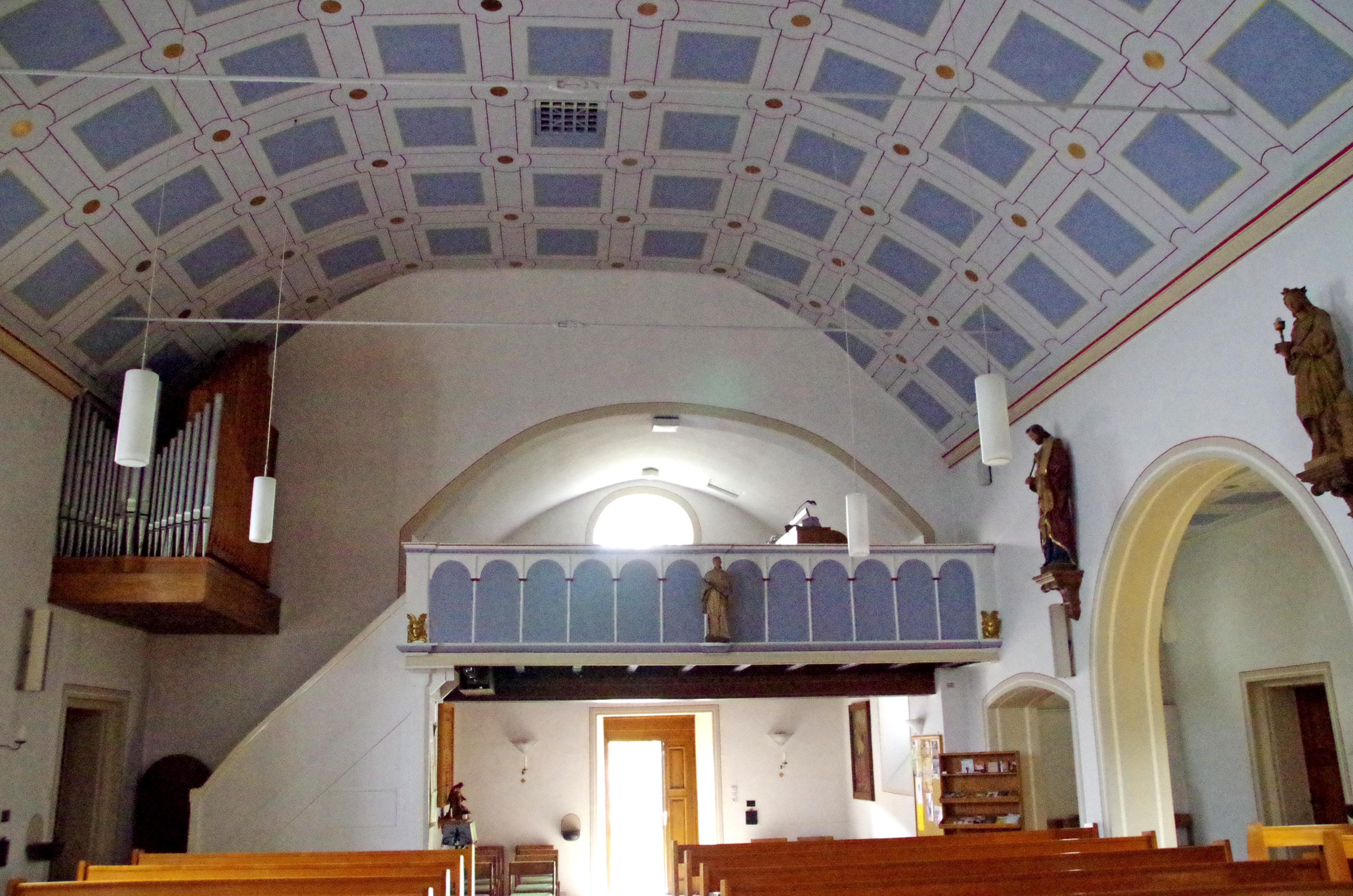 St. Wendelin (Eiserfey), Langhaus mit Empore